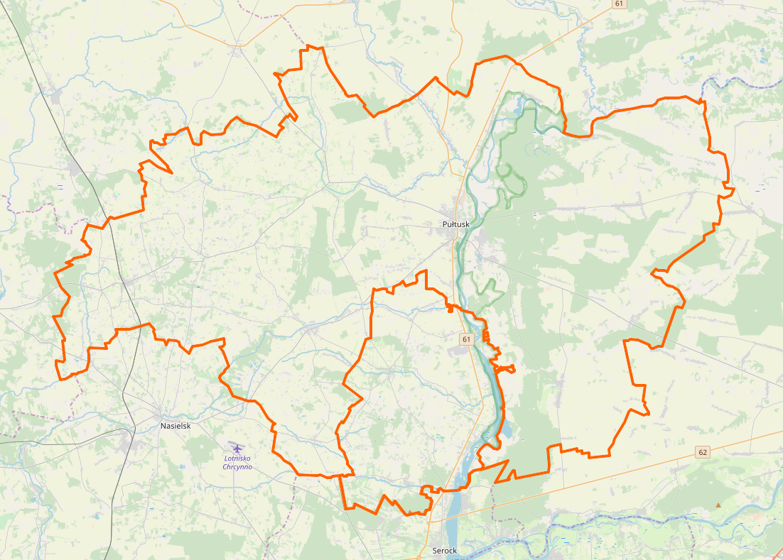 Gmina Pokrzywnica na tle powiatu pułtuskiego